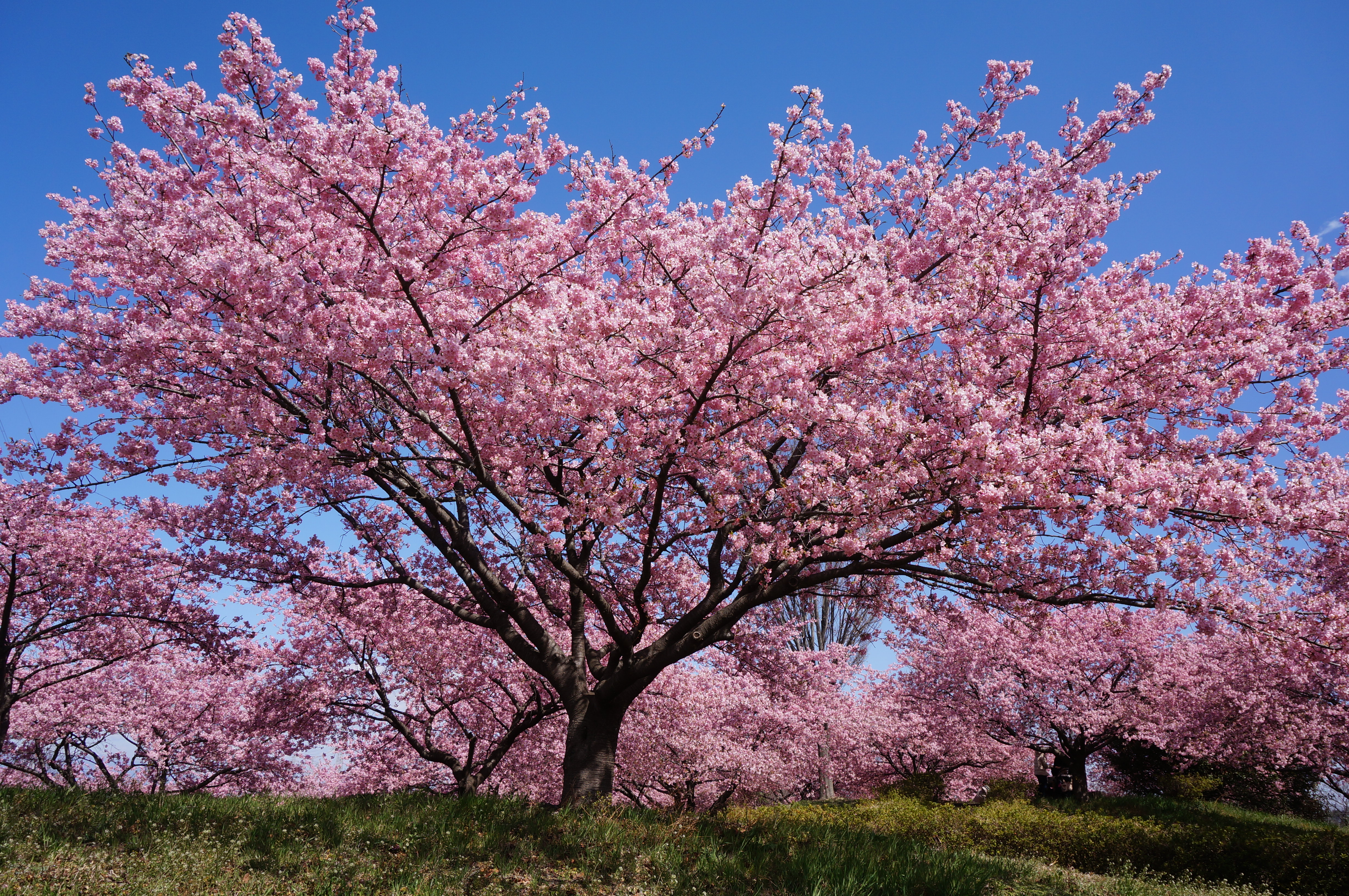 カワヅザクラ（埼玉県深谷市榛の森公園にて）